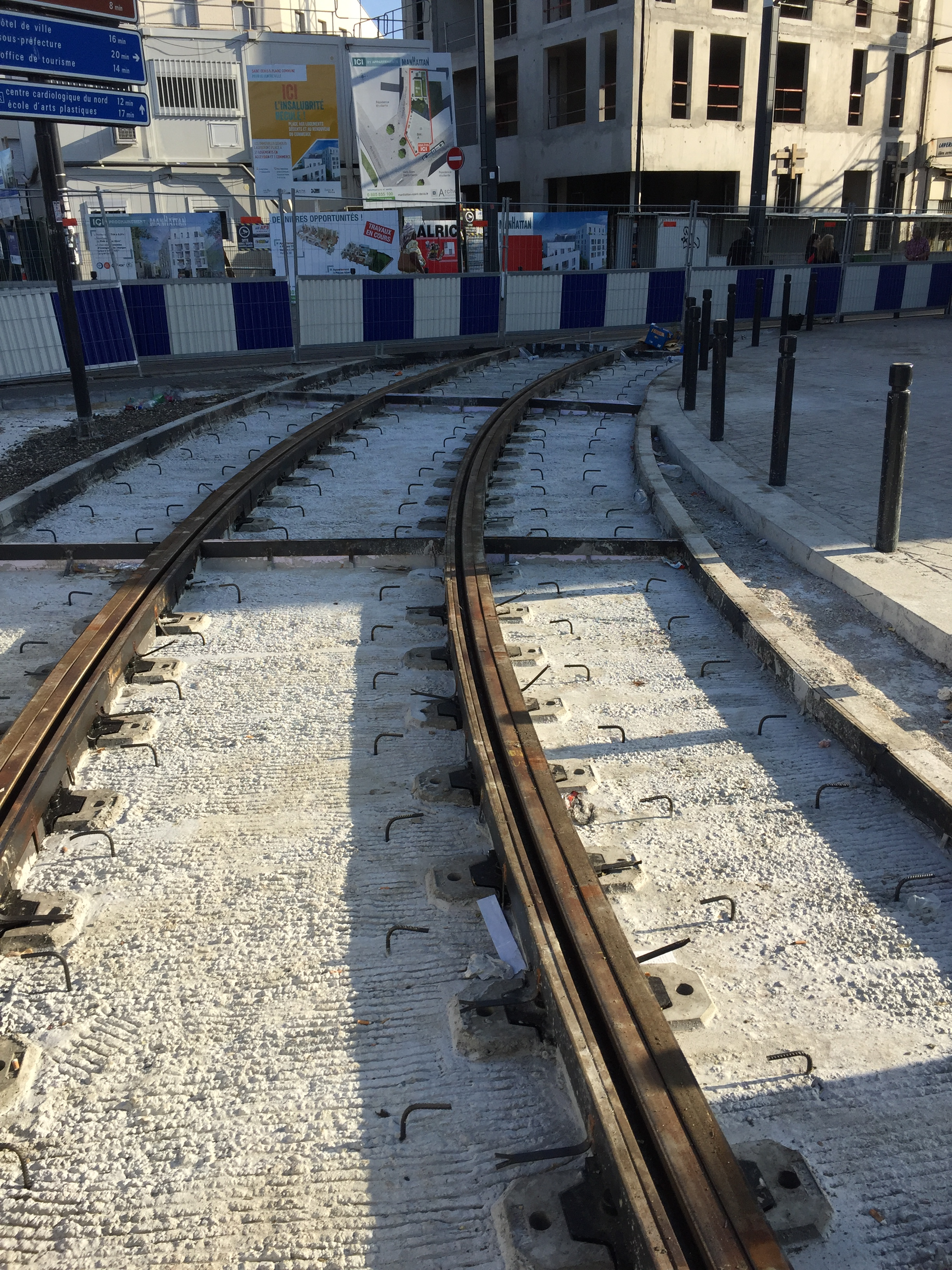 A Saint-Denis, durant l'été 2018, la connexion entre les lignes T1 et T8 en construction.